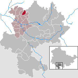 Eichenberg in Thuringia - district Hildburghausen